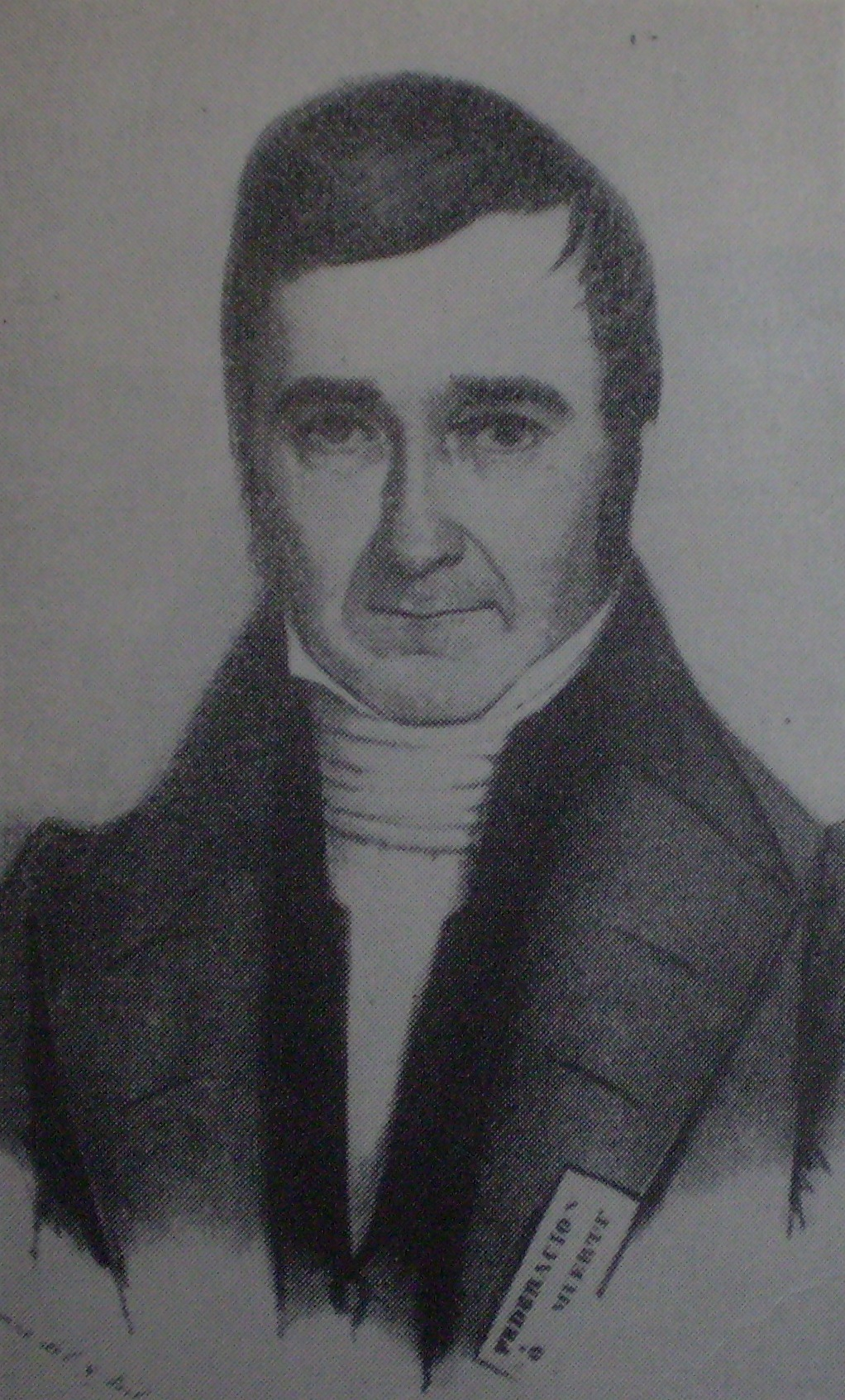 Felipe Arana, dibujo de Carlos E. Pellegrini. Original en el Archivo General de la Nación